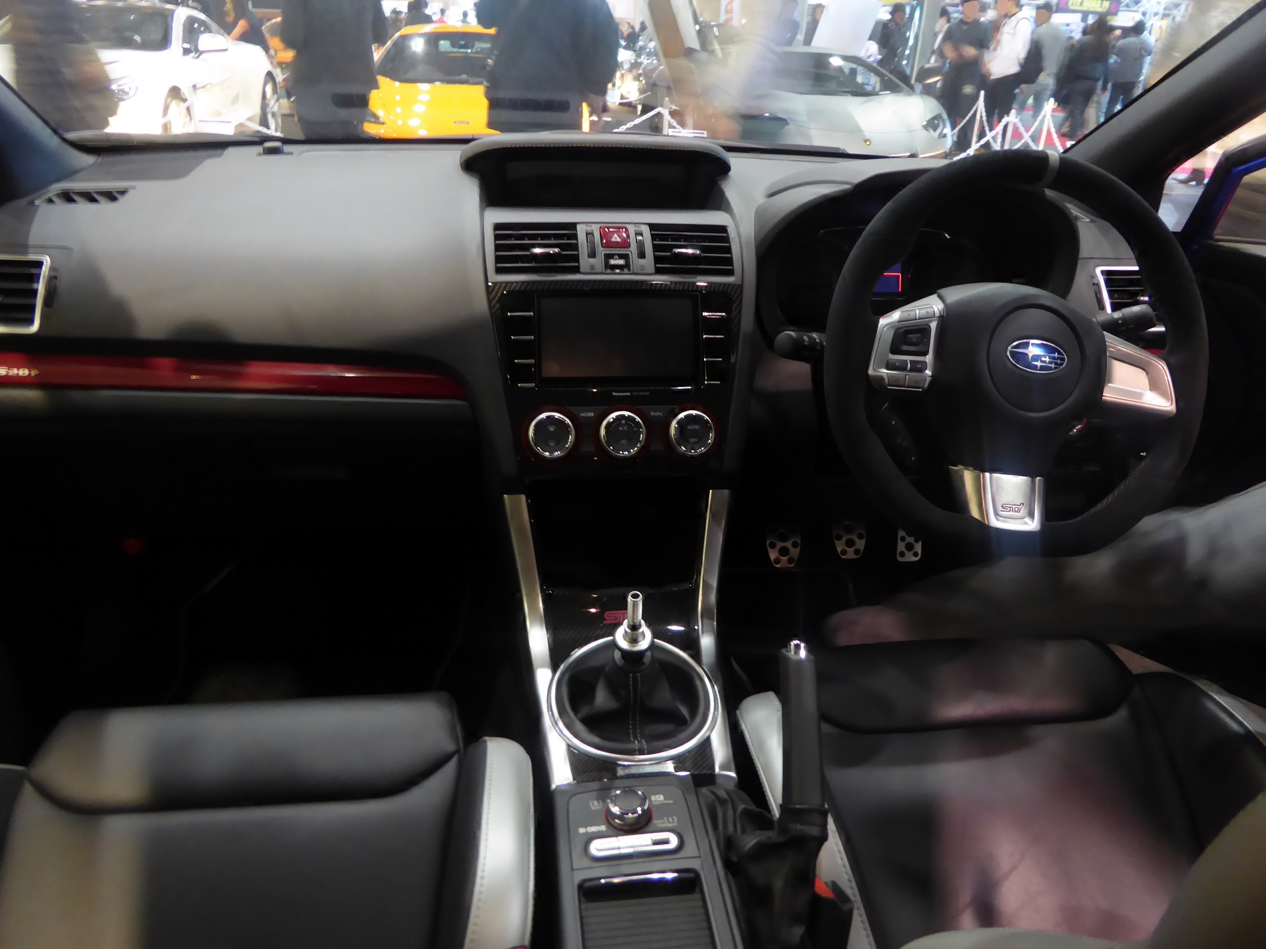 大阪オートメッセ2016においてCBA-VAB型スバル・WRX STI S207を撮影。